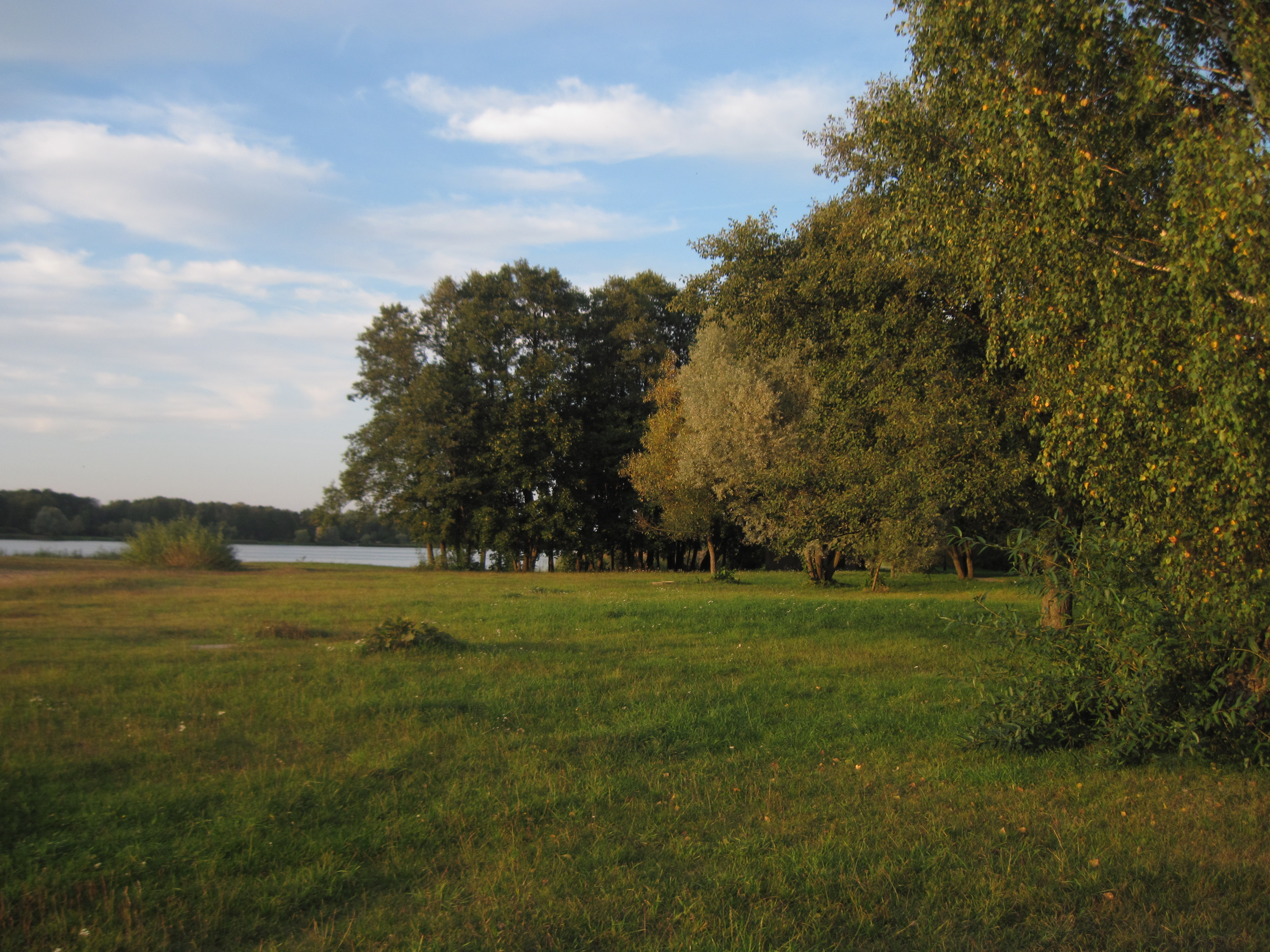 Частка Марысінага парку. Нясвіж